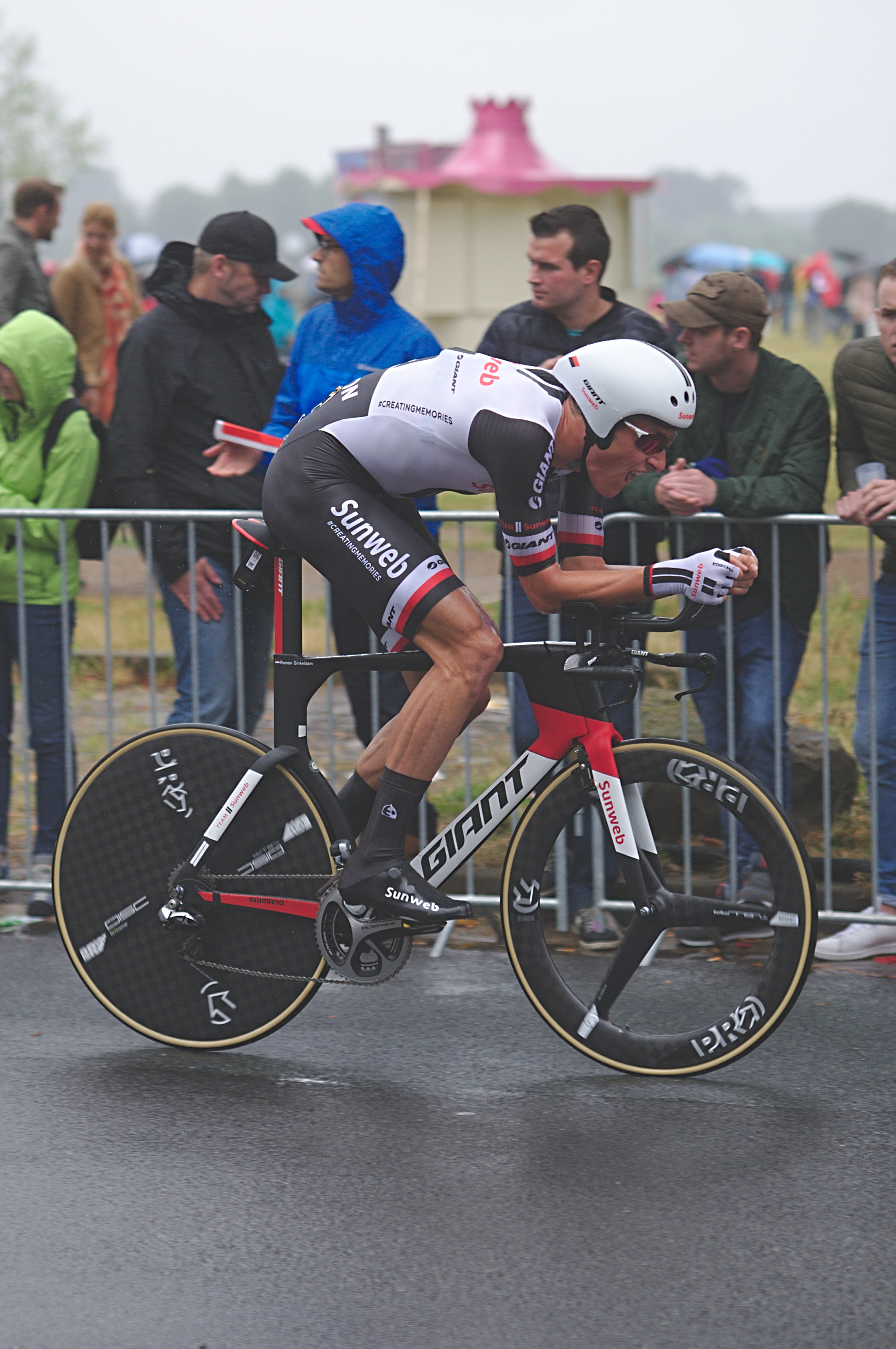 Einzelzeitfahren beim Grand Départ in Düsseldorf, Tour de France 2017: Ramon Sinkeldam (Team Sunweb)